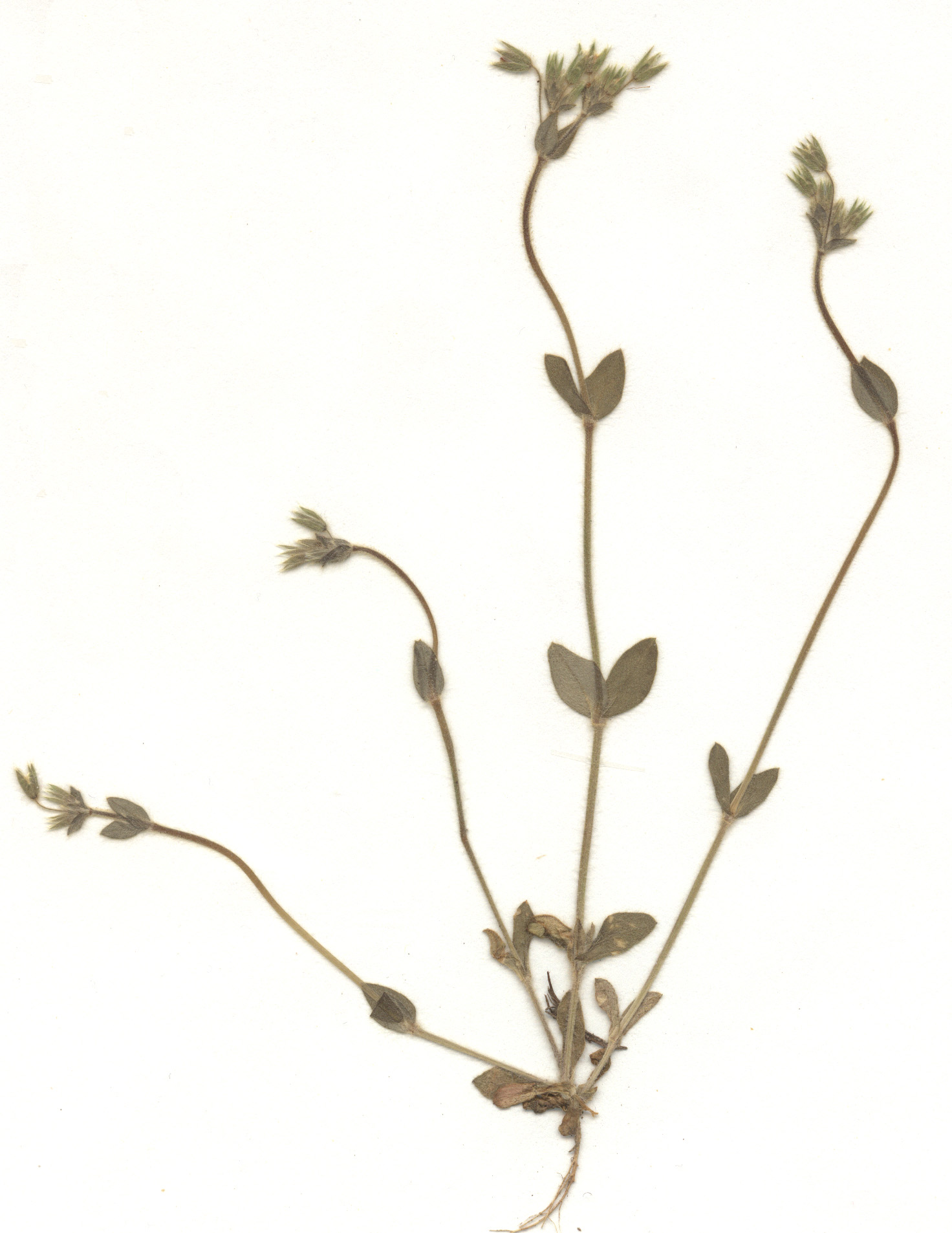 Cerastium brachypetalum, eigener Herbarbeleg von 1987, Unterfranken